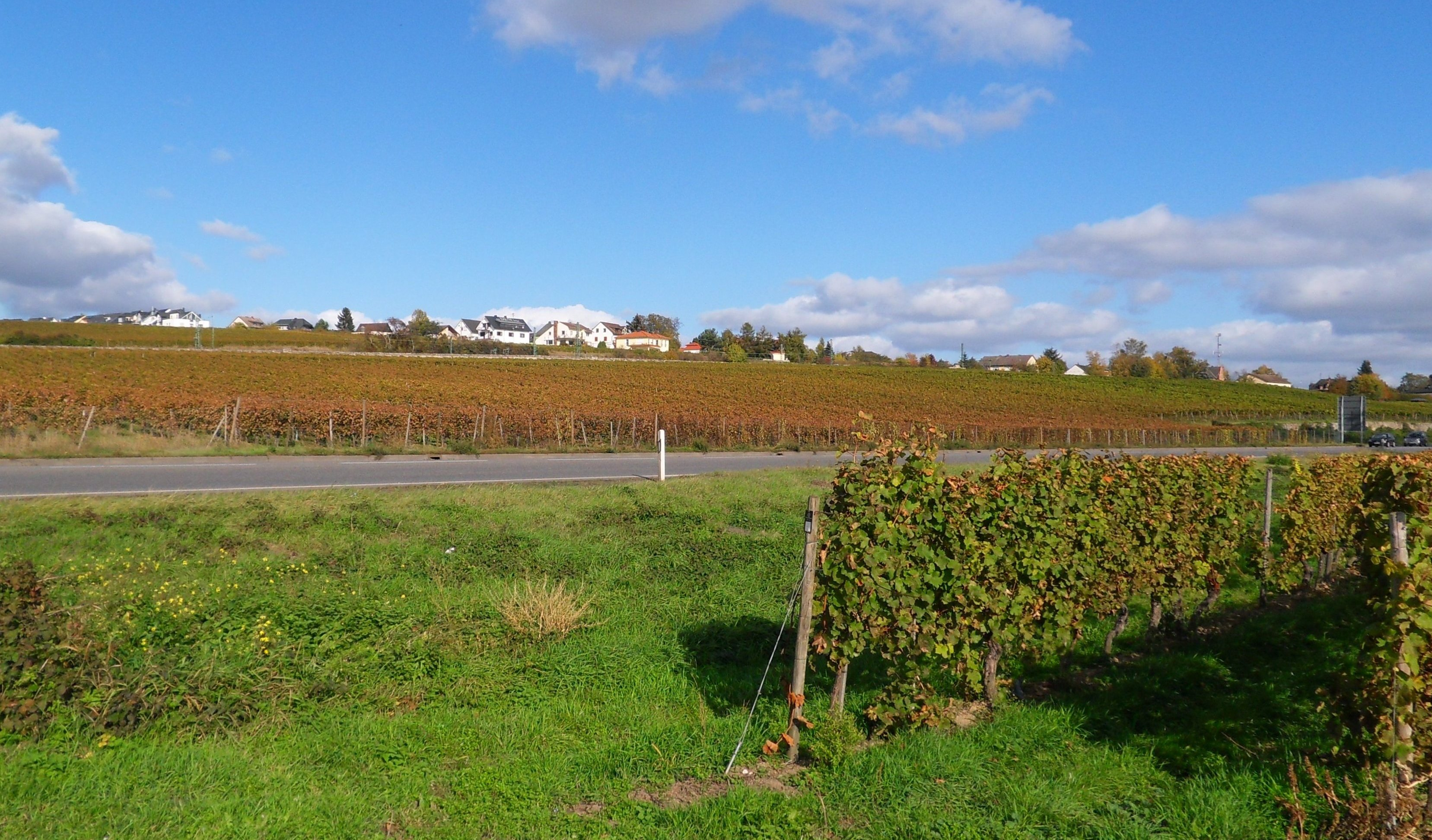 Die Weinlage Hattenheimer Pfaffenberg im Herbst. Dahinter Hattenheim, vorne die Bundesstraße 42. Blick von Südwesten. Ungewöhnlich frühe nächtliche Bodenfröste haben das Weinlaub überall dort, wo sich Kaltluft sammeln konnte, absterben lassen und braun gefärbt. Im höher und näher am Ort gelegenen Teil der Weinberge am rechten Bildrand war das grünende Laub besser vor dem Frost geschützt und hat keinen Schaden genommen.